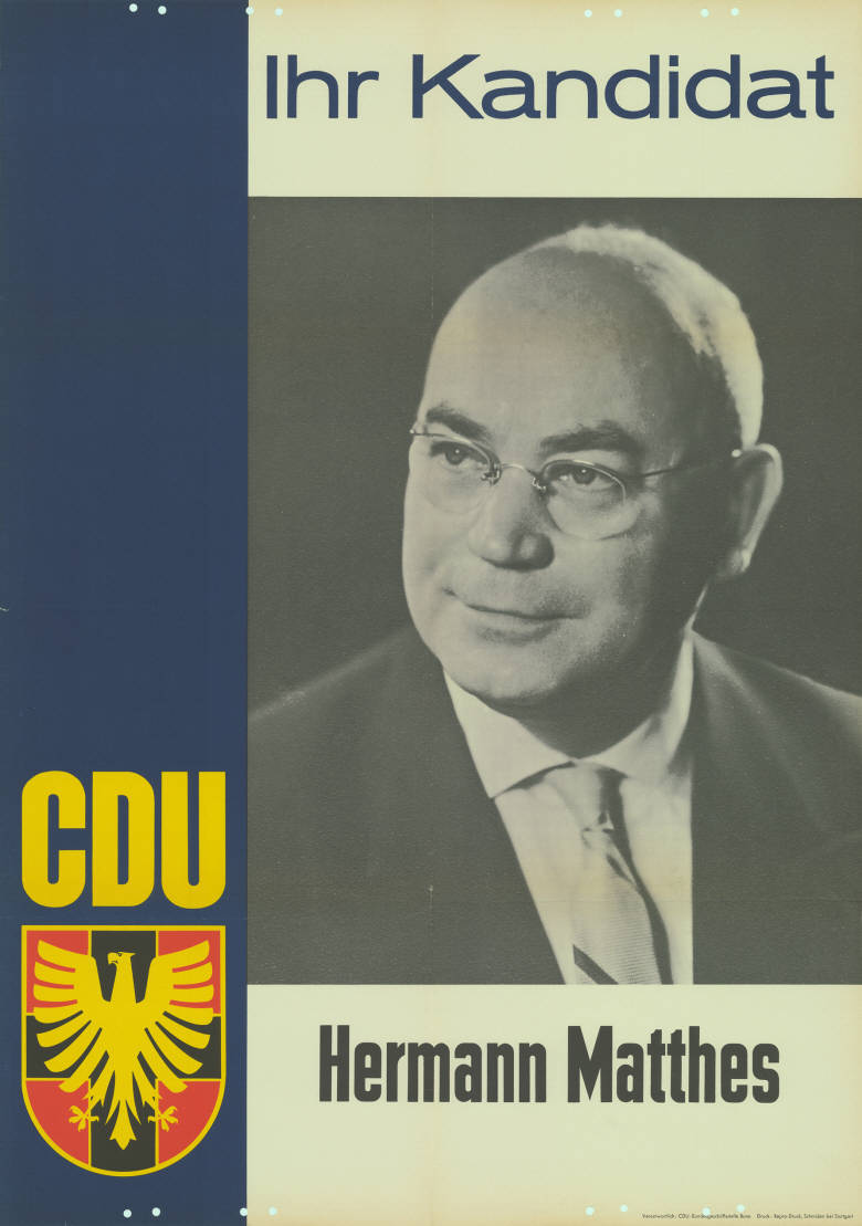 Ihr Kandidat CDU Hermann Matthes Abbildung: Porträtfoto Kommentar: Rückseitig rot beschriftet. Plakatart: Kandidaten-/Personenplakat mit Porträt Auftraggeber: Verantw.: CDU-Bundesgeschäftsstelle Bonn Drucker_Druckart_Druckort: Repro-Druck, Schmiden bei Stuttgart Objekt-Signatur: 10-010 : 222 Bestand: Landtagswahlplakate Rheinland-Pfalz (10-010) GliederungBestand10-18: Landtagswahlplakate Rheinland-Pfalz (10-010) » CDU Lizenz: KAS/ACDP 10-010 : 222 CC-BY-SA 3.0 DE